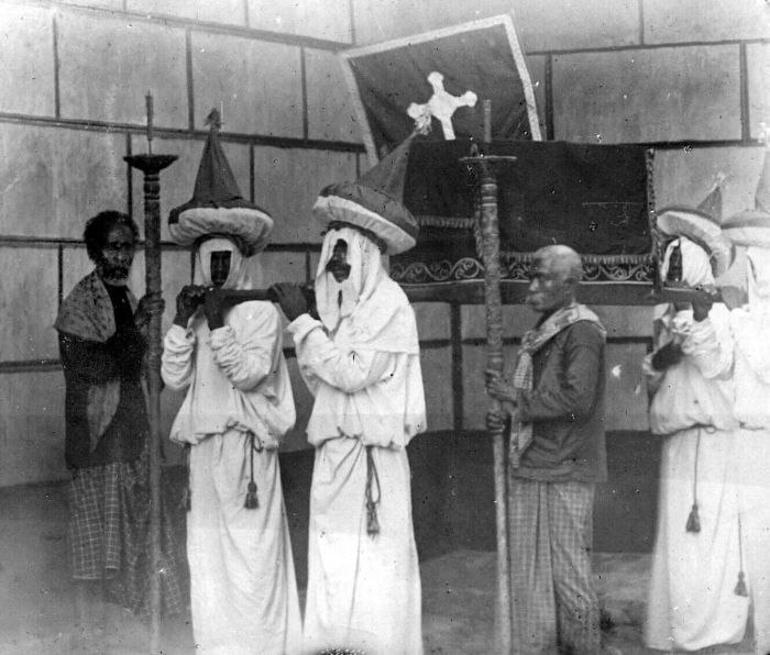 Repronegatief. Processie op Goede Vrijdag: Nicodemussen met een lijkbaar in oud-Portugese kostuums, Flores.